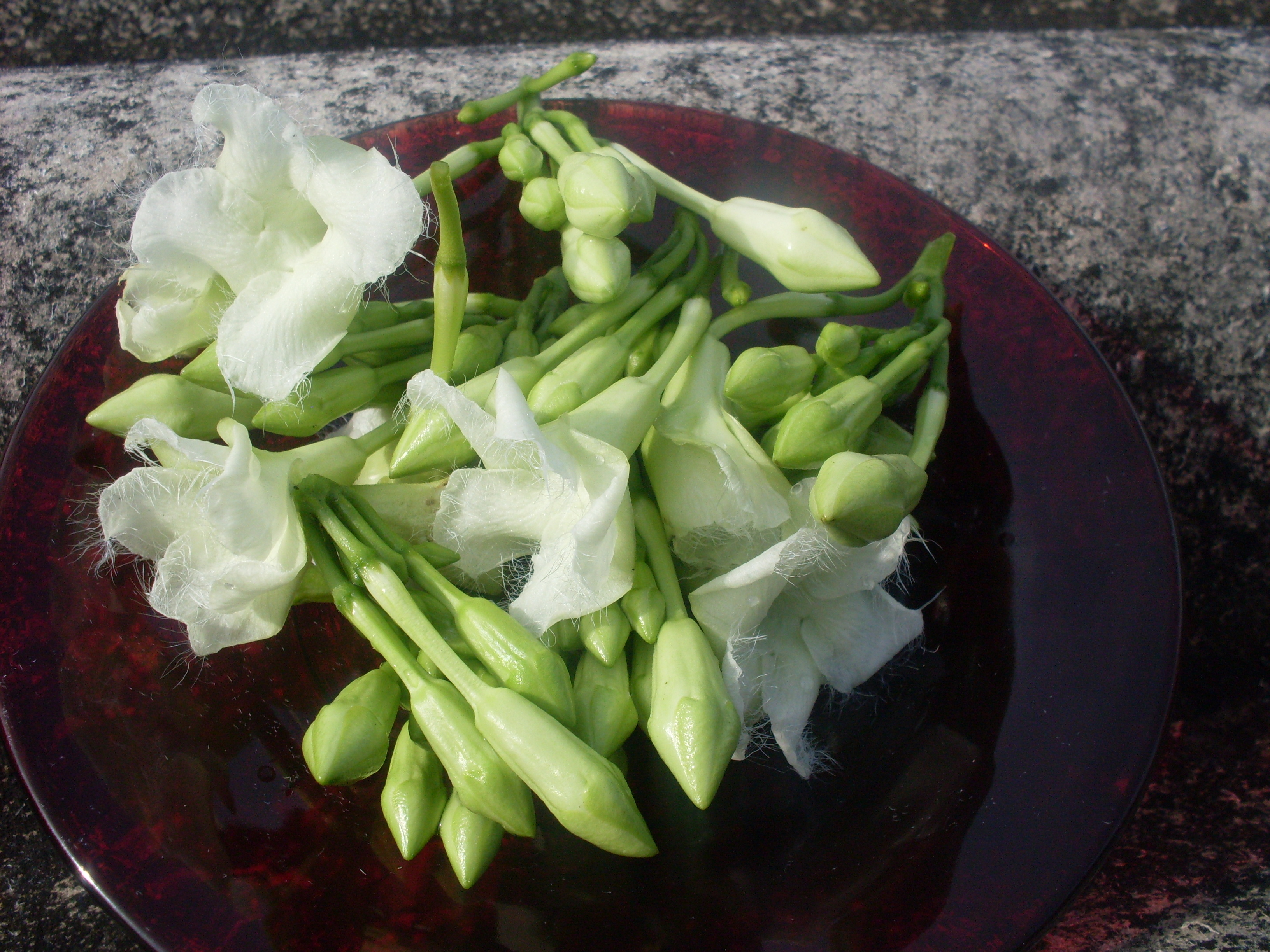 Loroco nativo de El Salvador 4